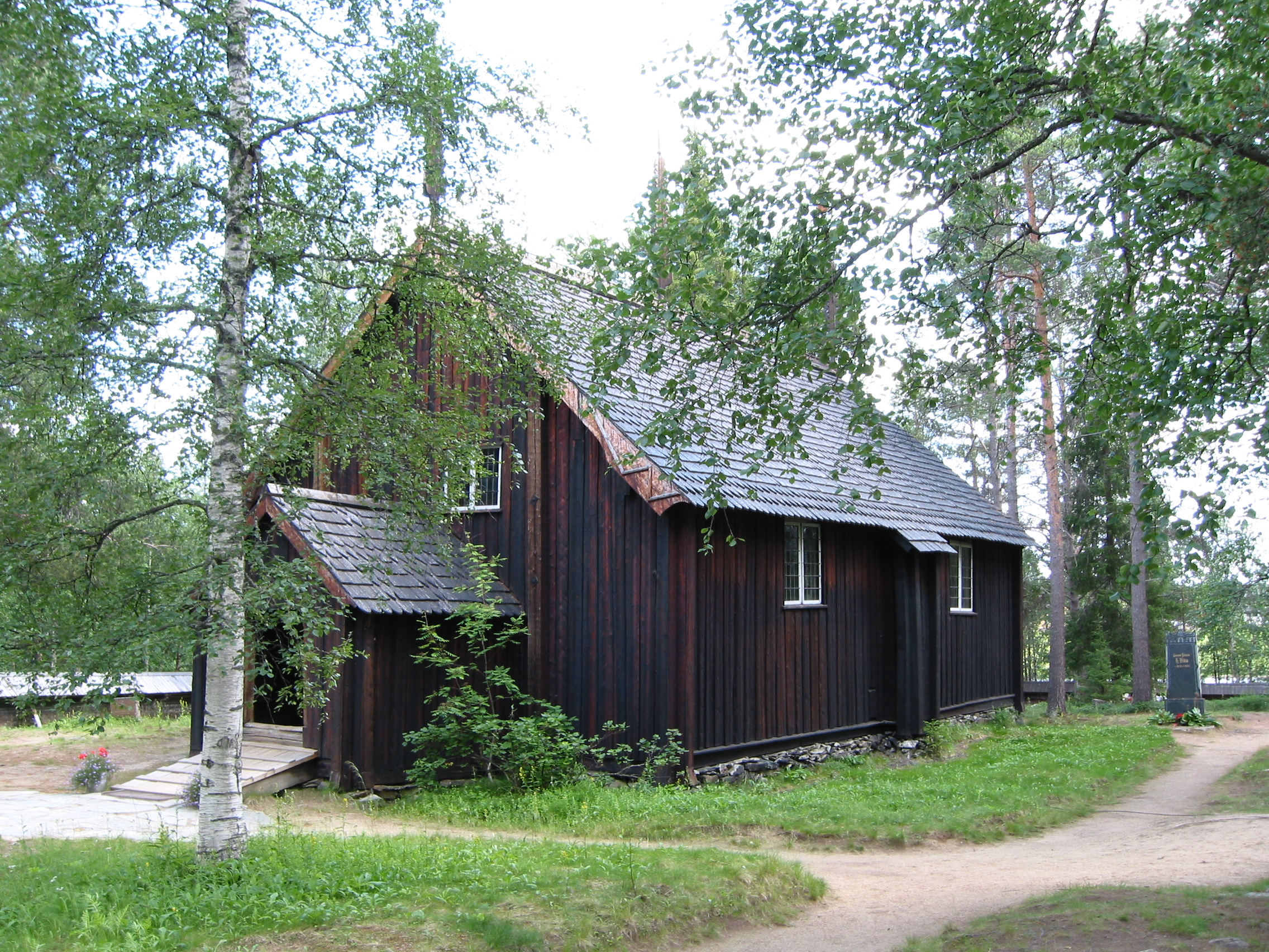 Sodankylä old church, Finland